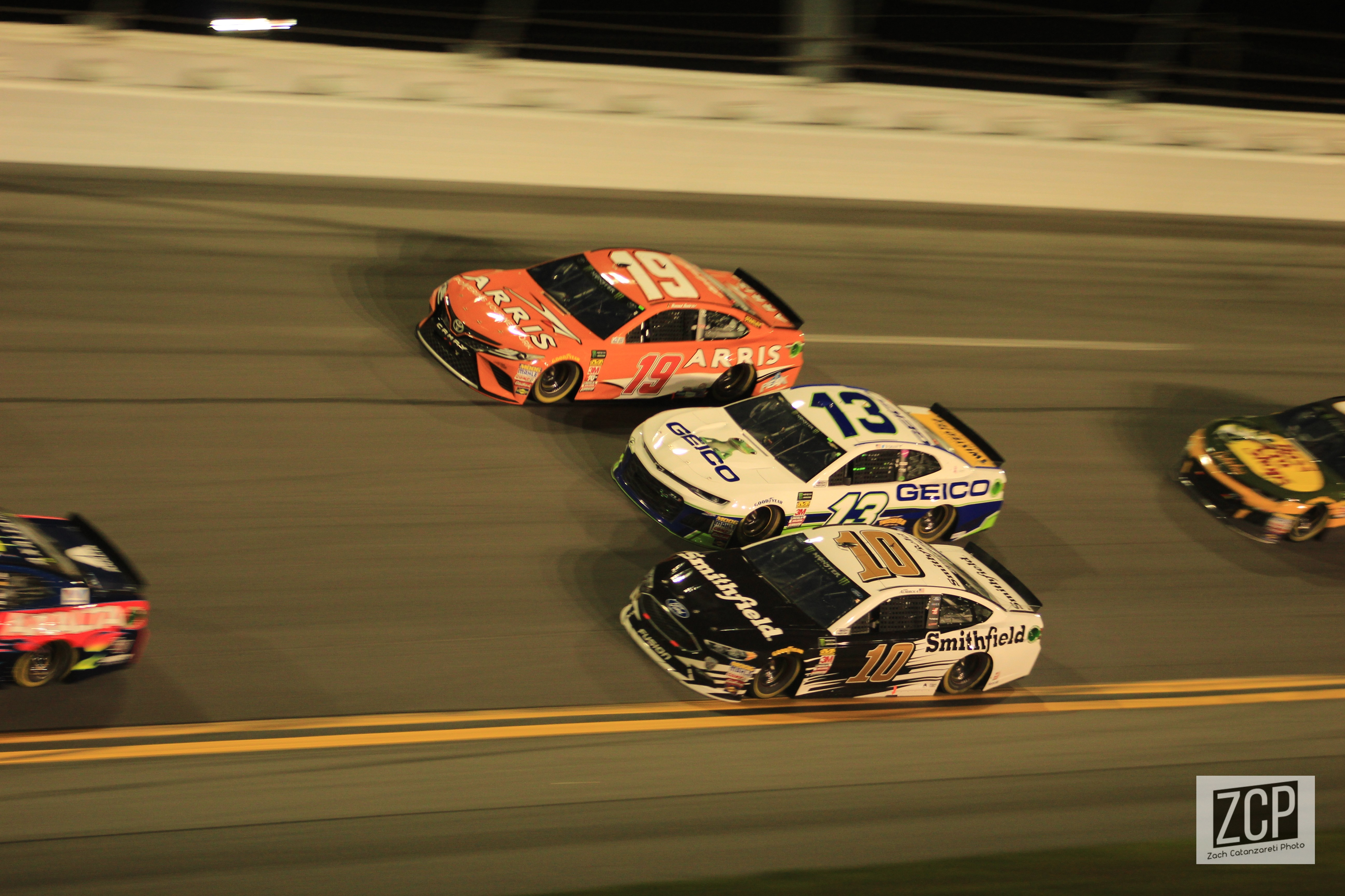 2018 Daytona 500